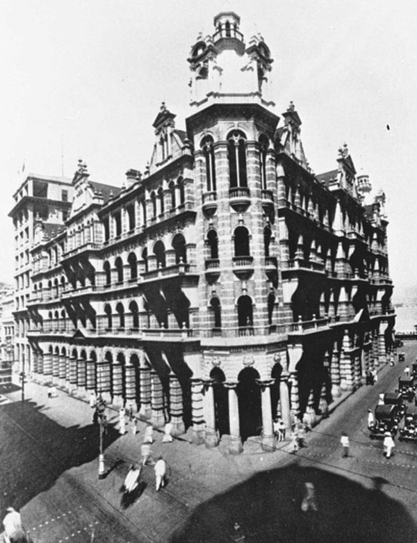 中文（香港）: 1946年香港郵政總局。